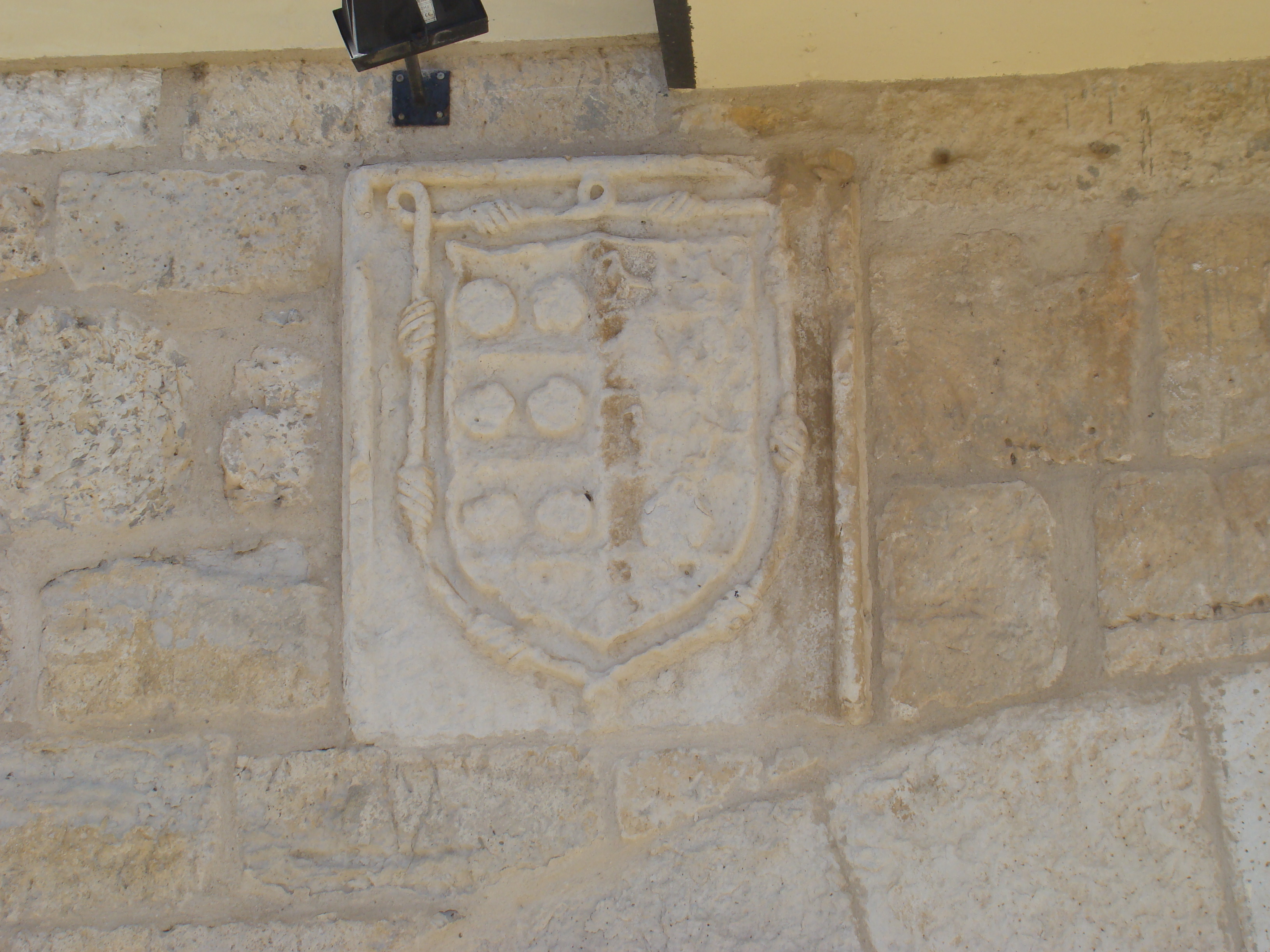 Casa Calderón Castro. Situada en la Calle Corro Vaca nº 5 de Cigales, Valladolid. Es la antigua casa de D. Francisco Calderón, mayordomo de los Duques de Frías. Construida entre finales del siglo XV y principios del XVI sobre zócalo de piedra. Tiene dos pisos. La portada es de piedra caliza y tiene un arco escarzano con grandes dovelas. A derecha e izquierda están labrados los escudos de los Calderón y los Castros. La casa sirve de sede para el Consejo Regulador de la Denominación de Origen de Cigales.